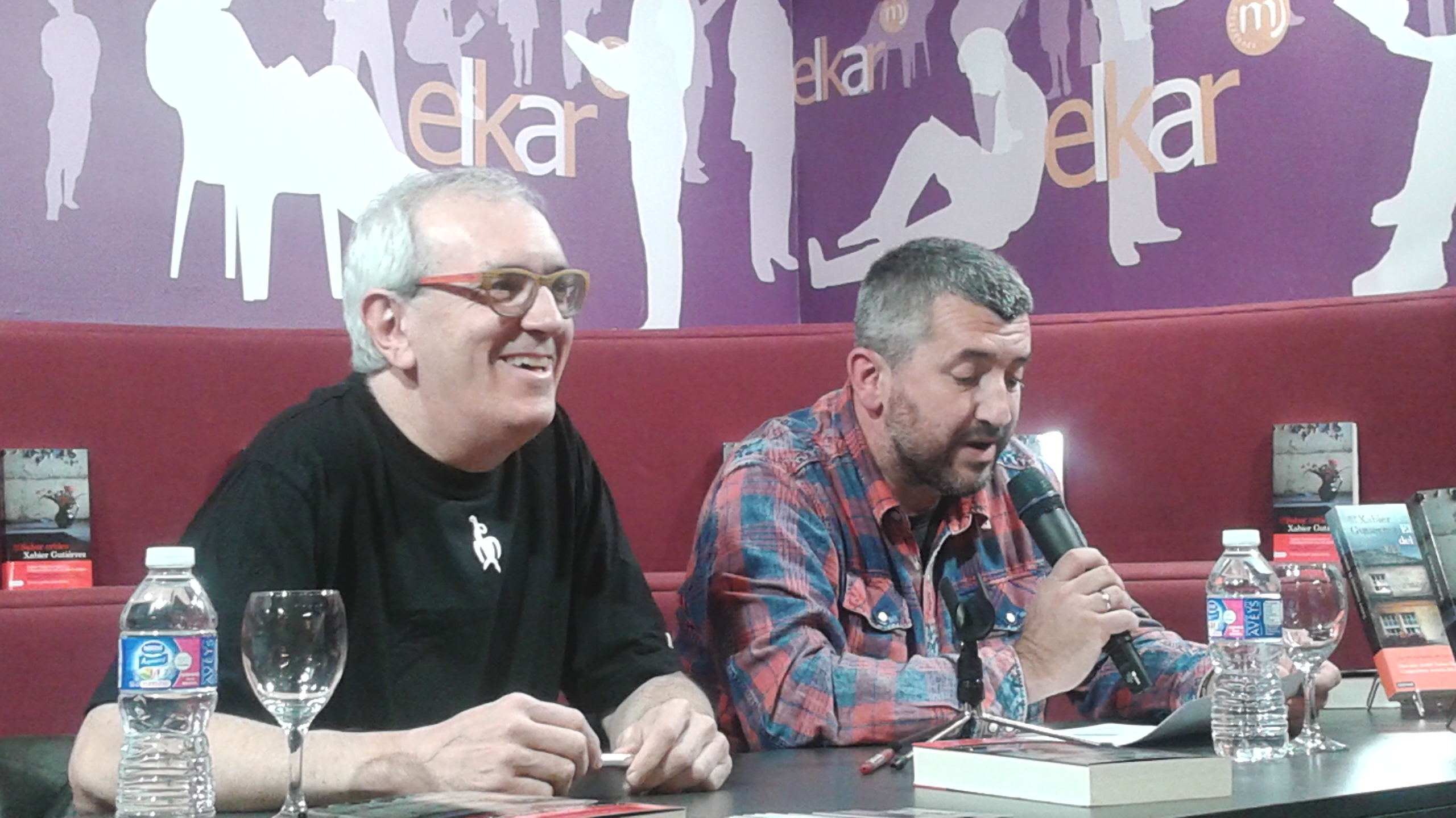 Literaktum 17 Xabier Gutiérrez & Josema Azpeitia Elkar aretoa Argazkilaria/fotógrafa: Nagore Irastorza